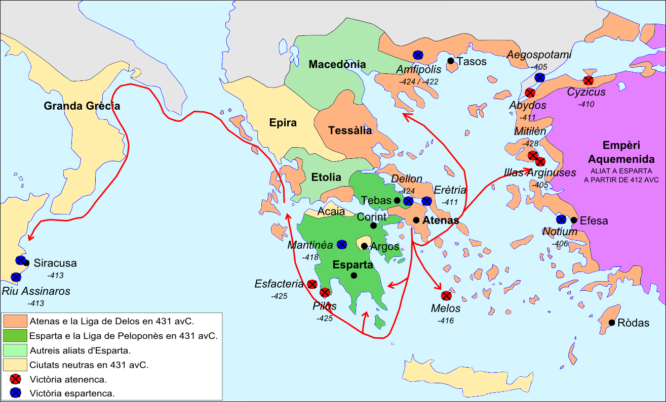 Esquèma generau de la guèrra de Peloponès